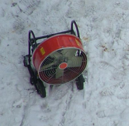 Straż pożarna - wentylator strażacki